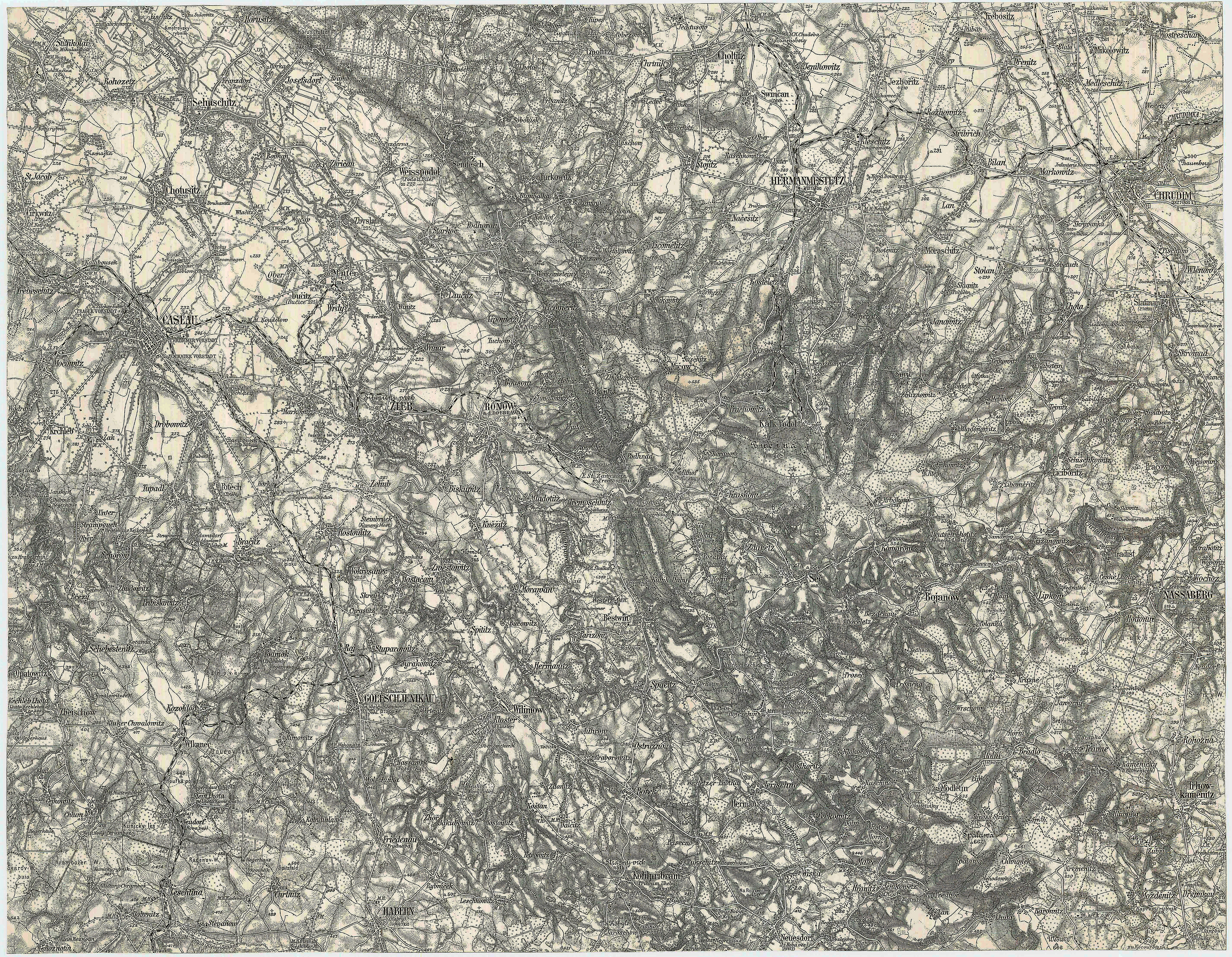 historische Landkarte: Spezialkarte 1:75.000, franzisco-josephinische (3.) Landesaufnahme der österreichisch-ungarischen Monarchie. Blatt Caslau 4055, Zone 6 Kol. XIII im üblichen Blattschnitt (mit dem Tal der Doubrawa, Chrudim, Habern, Nassaberg, Goltsch Jenikau, Zleb, Hermanmestez, Ronow)